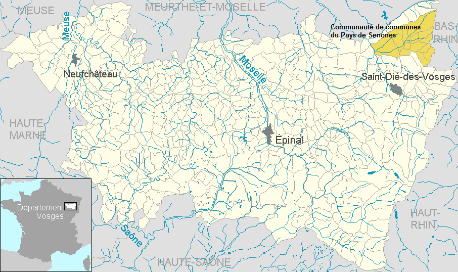 Communauté de communes du Pays de Senones dans le département des Vosges, Lorraine, France